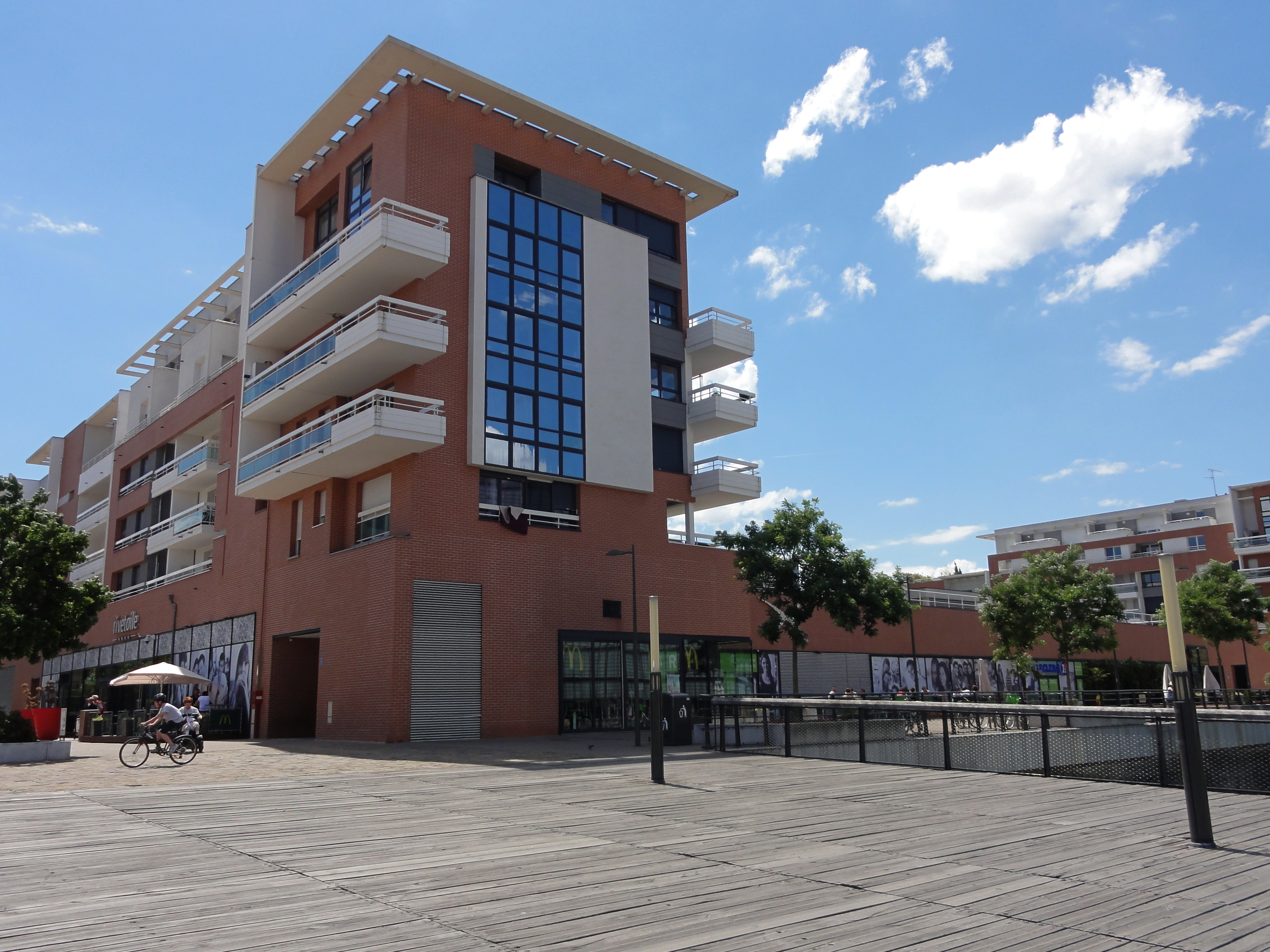 Alsace, Bas-Rhin, Strasbourg-Neudorf, Rivétoile, Quai Jeanne Helbling.